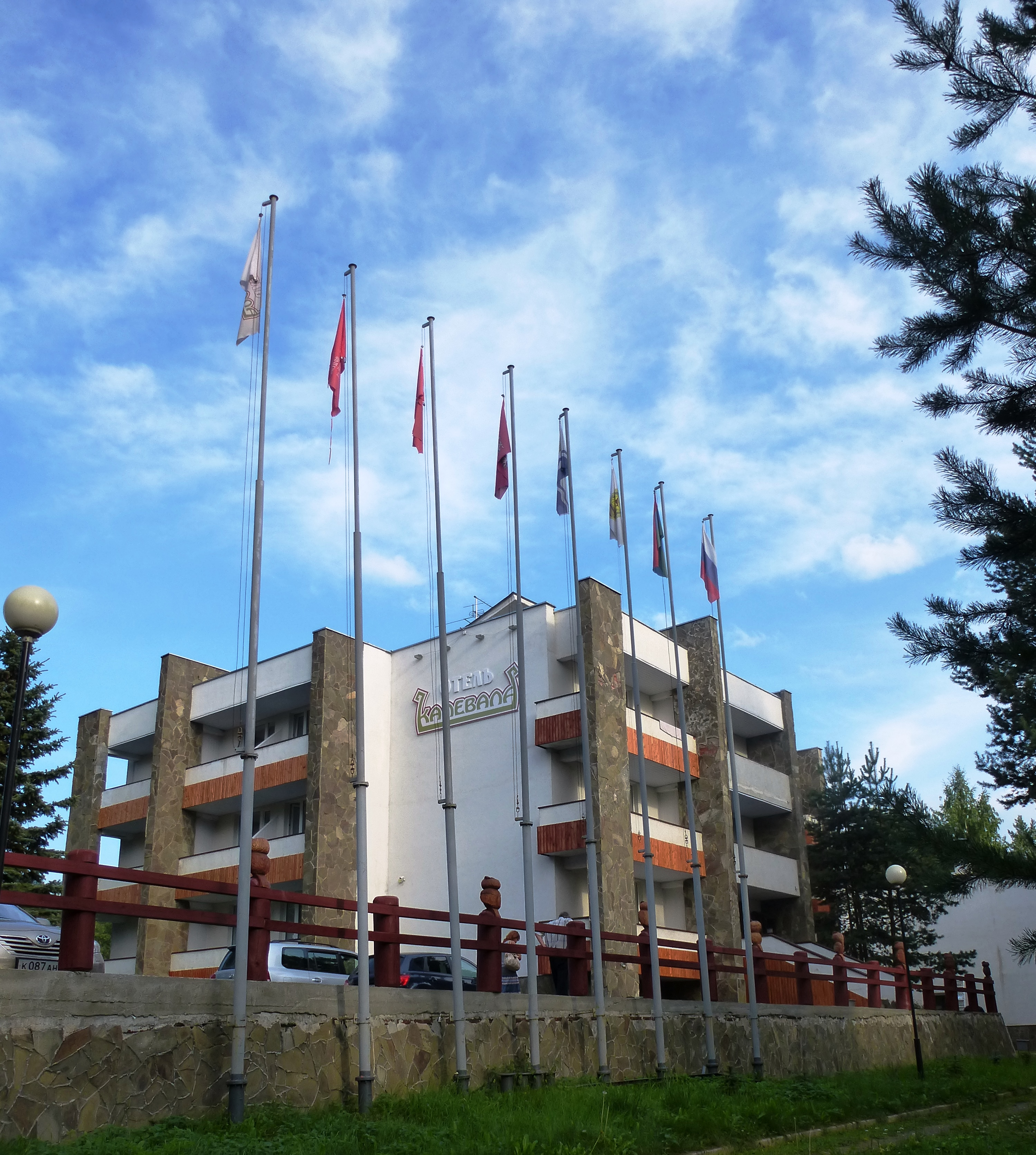 Отель "Калевала" близ дер.Косалма Прионежского района Карелии.